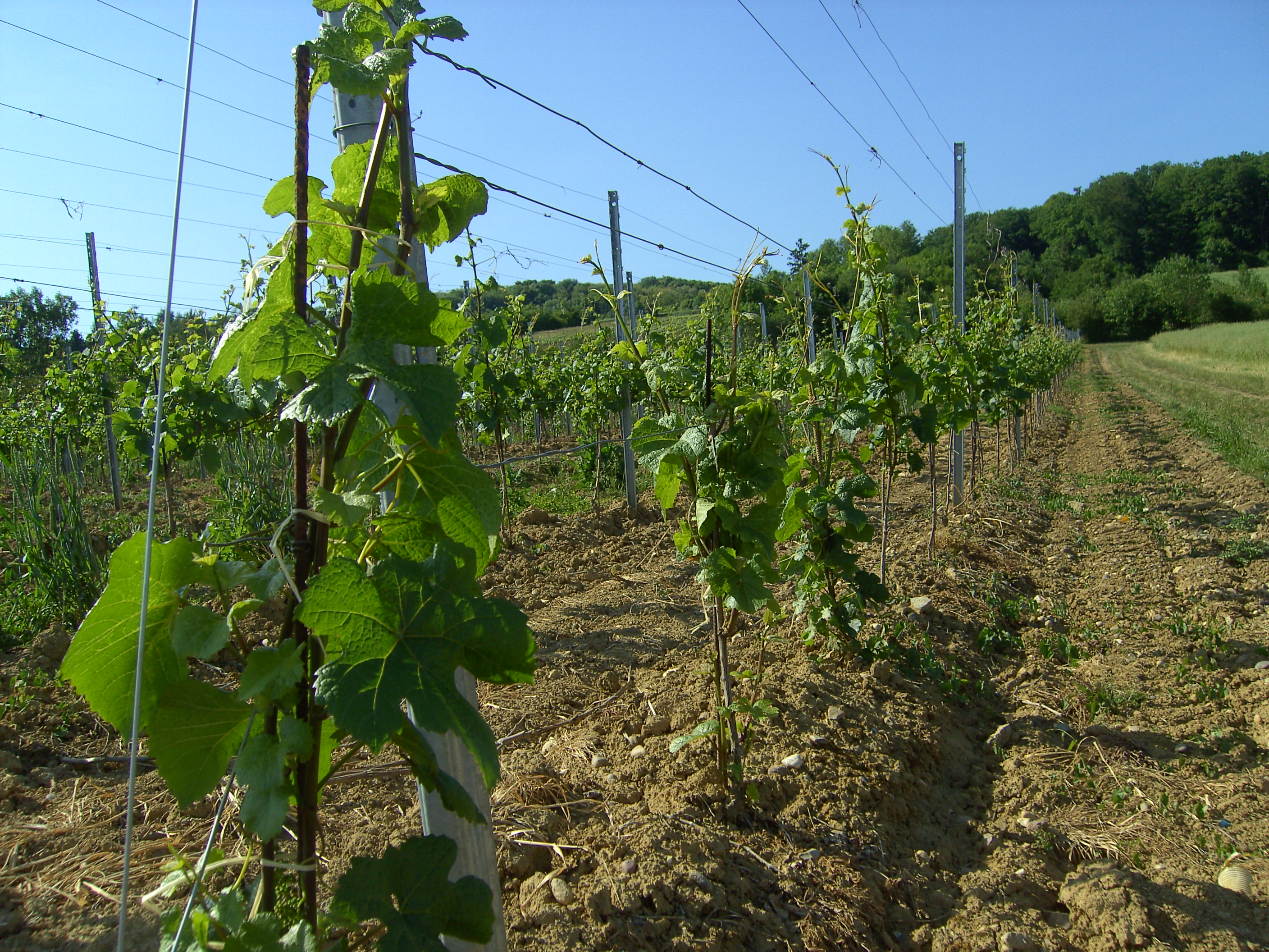 Vignes que l'on peut observer à la ferme de Sommy, près de Féy